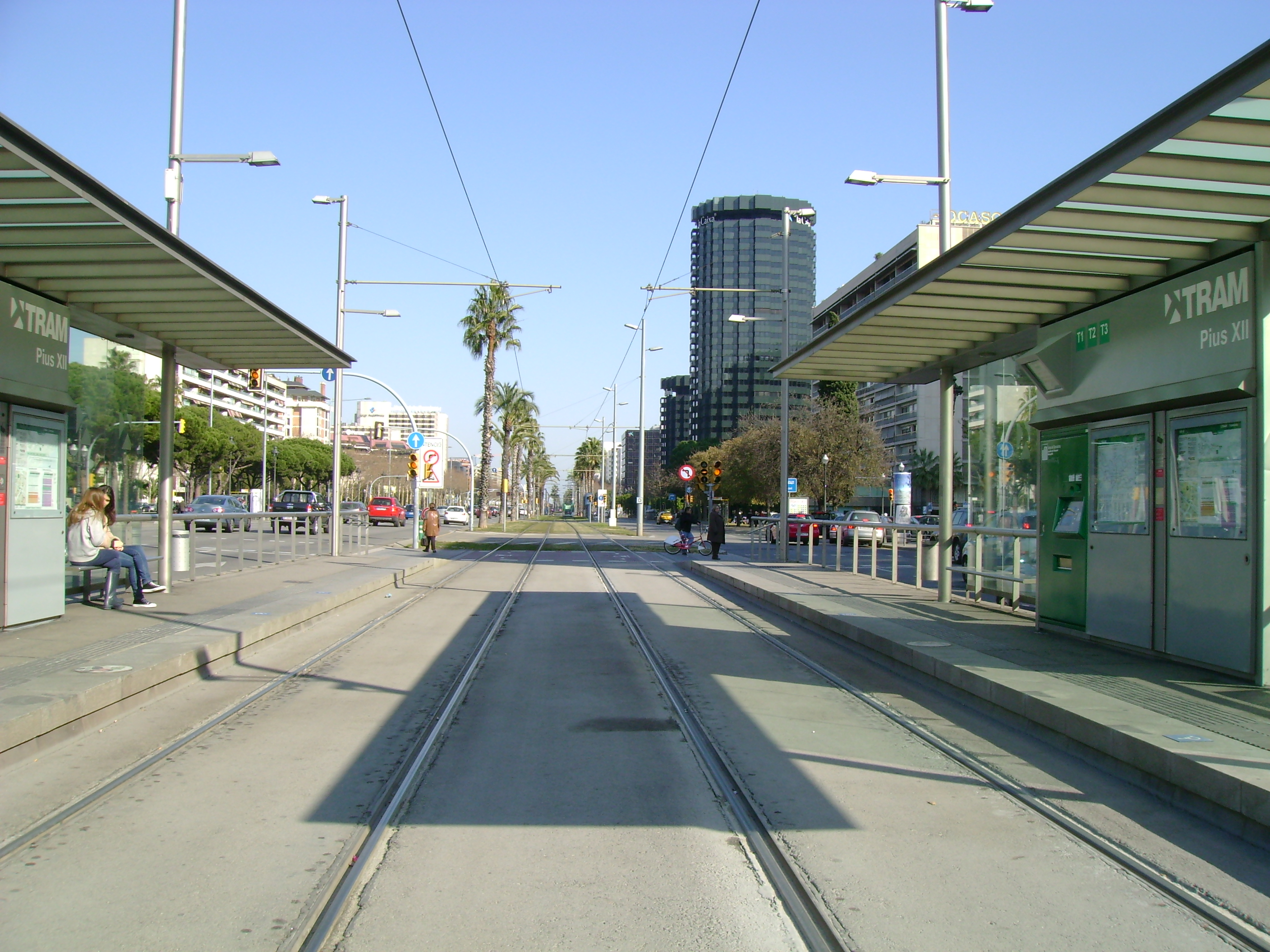 Foto capturada per la meva càmara a l'estació de Pius XII (Trambaix).